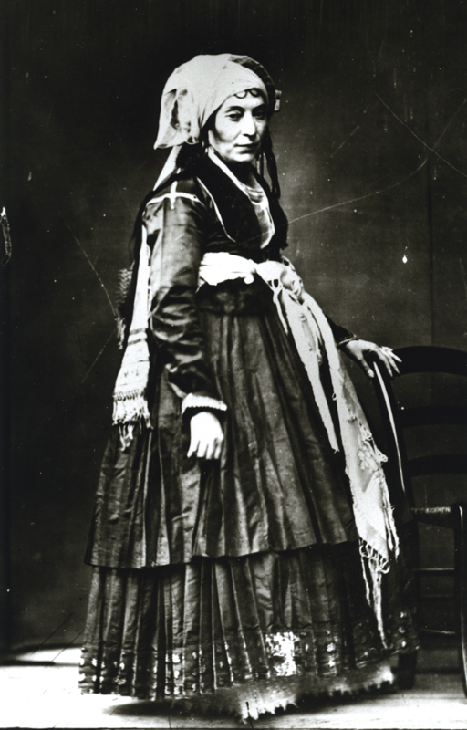 Γυναίκα από τα Ψαρά. Φωτογραφία: Φίλιππος Μαργαρίτης. Τέλη 19ου αιώνα Φωτογραφικό Αρχείο Πελοποννησιακού Λαογραφικού Ιδρύματος, Ναύπλιο